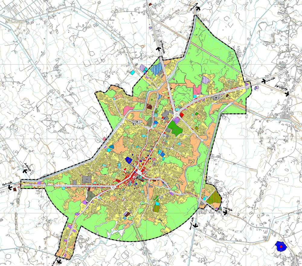 نقشه فومن